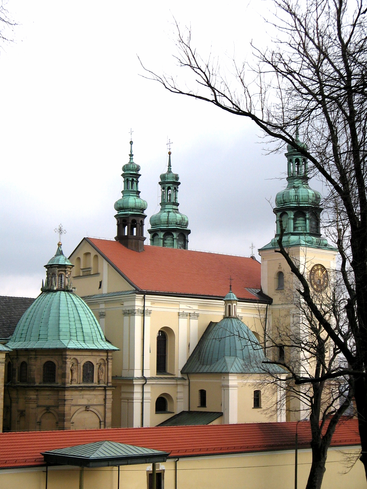 Kalwaria Zebrzydowska - Sanktuarium